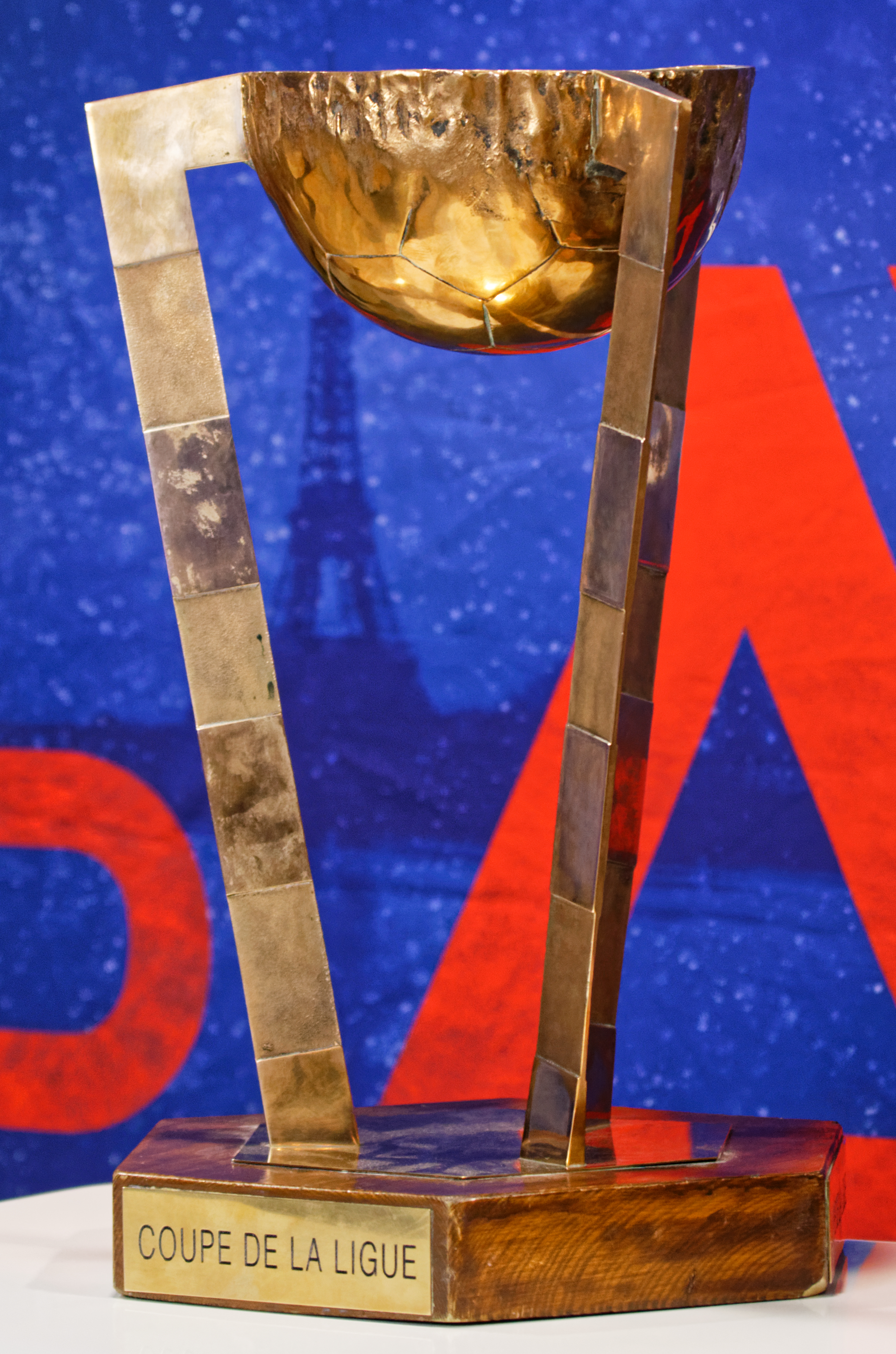 Le trophée de la Coupe de la Ligue de handball. Le PSG Handball, détenteur du titre, a présenté cette coupe au stade Pierre de Coubertin à Paris, lors du match PSG / Nîmes le 22 mars 2018.